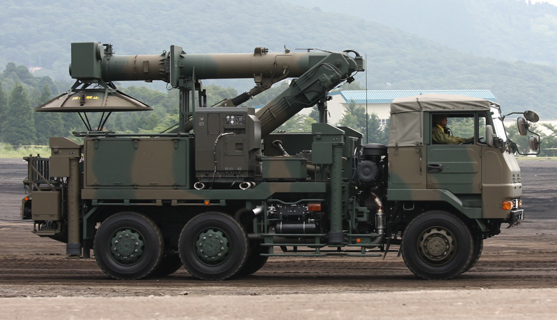 遠隔操縦観測システムの構成車両である追随装置。